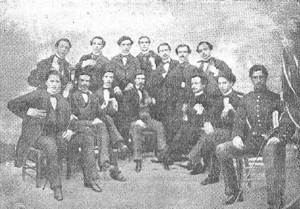 Fotografía que muestra al pensador español Francisco Giner de los Ríos (segundo por la derecha) junto a un grupo de compañeros de una peña literaria de Granada.